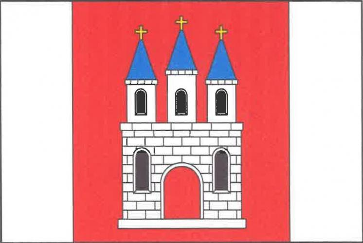 Kostelec na Hané vlajka